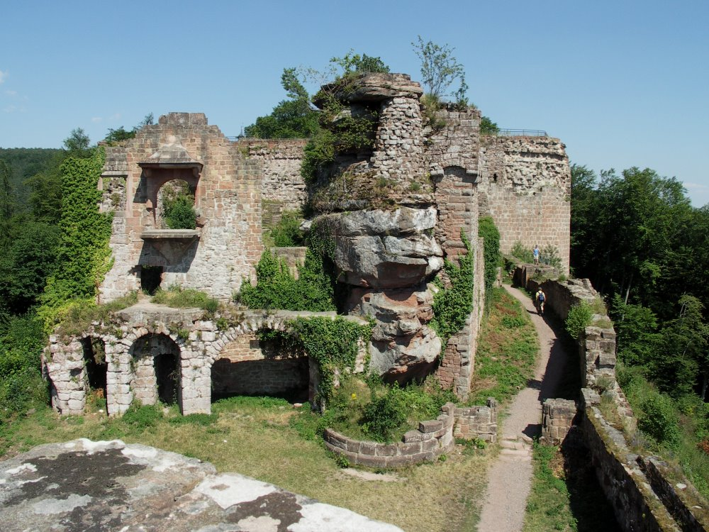 Neuscharfeneck, Blick vom Torturm zum Innenhof Datum: 17.7.2005 Fotograf: Peter Schmenger